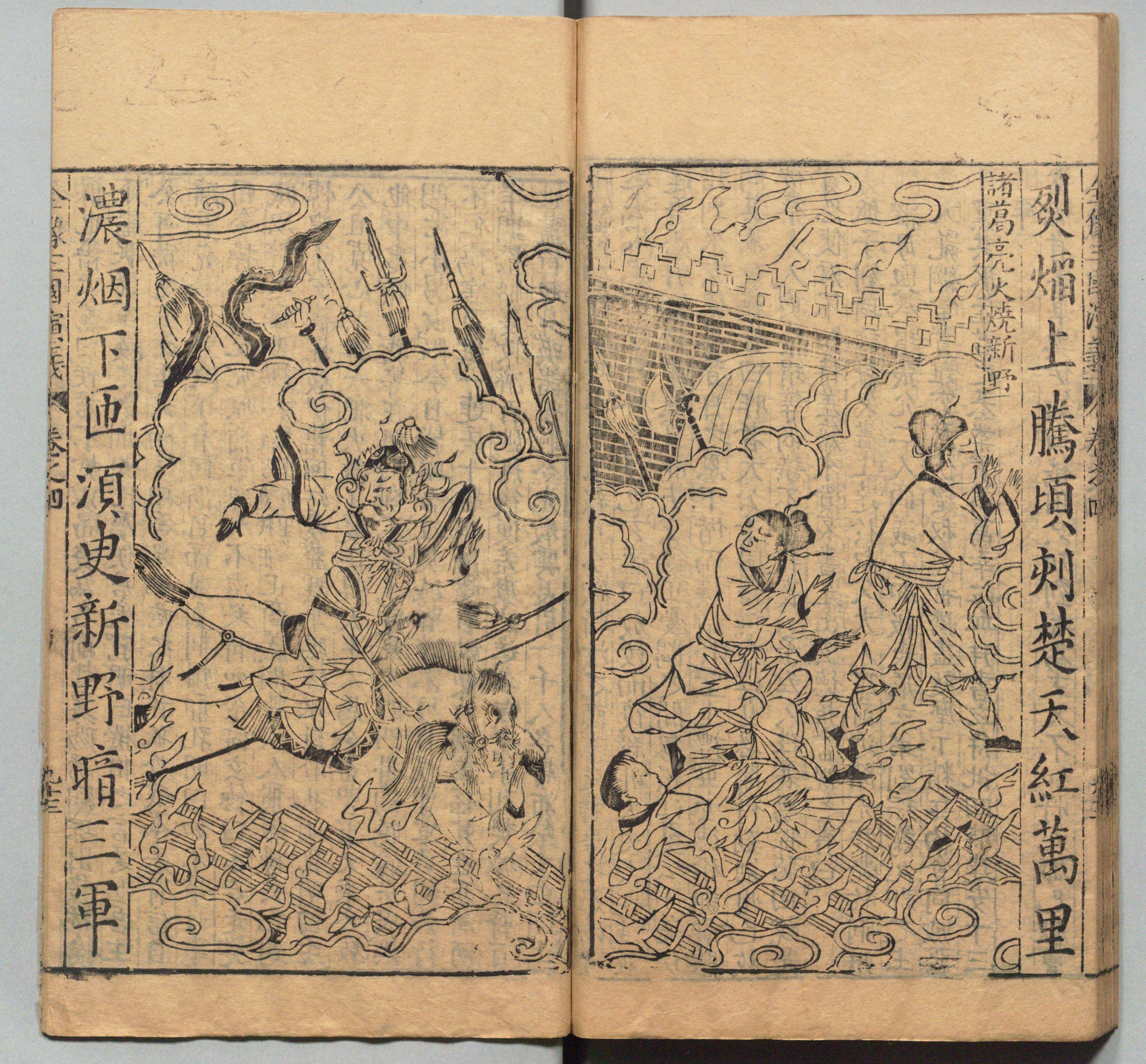 新刊校正古本大字音释三国志通俗演义 明万历十九年书林周曰校刊本